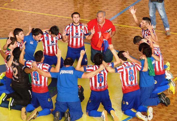 Foto da Seleção Paraguaia de Futebol de Salão no Mundial C-20 de 2014